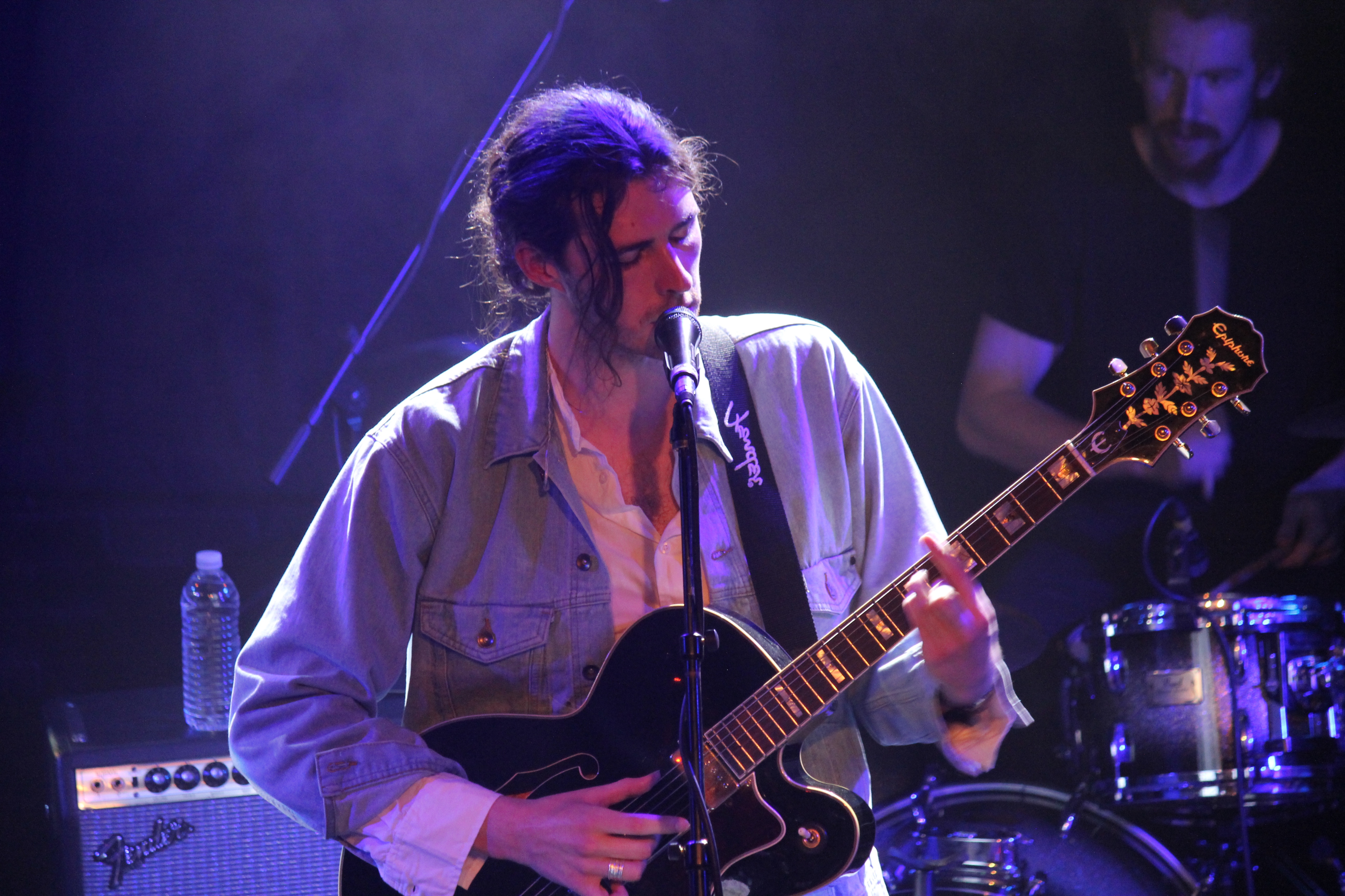 Neon Tommy/Katie Buenneke